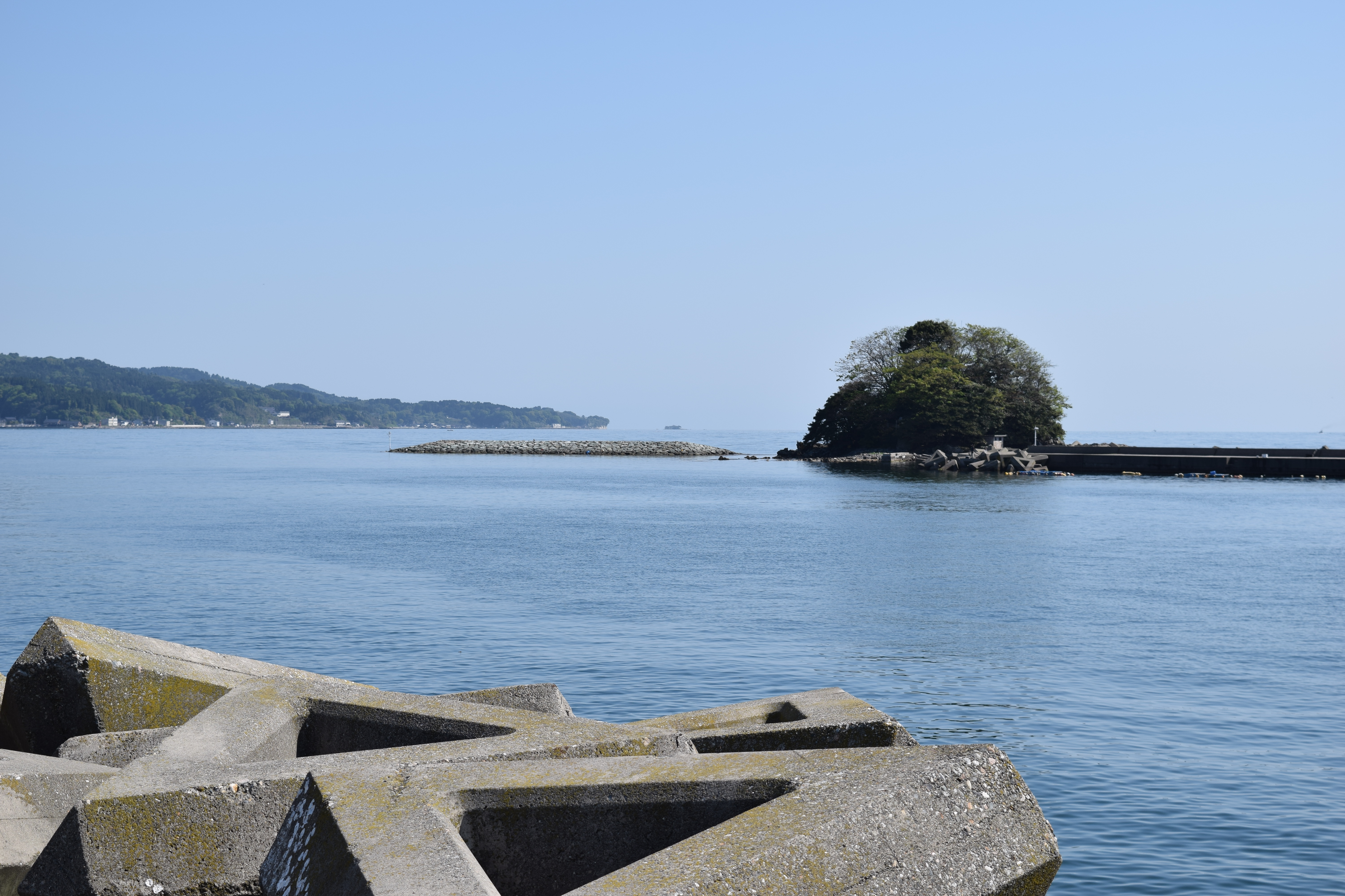 氷見港沖にある唐島